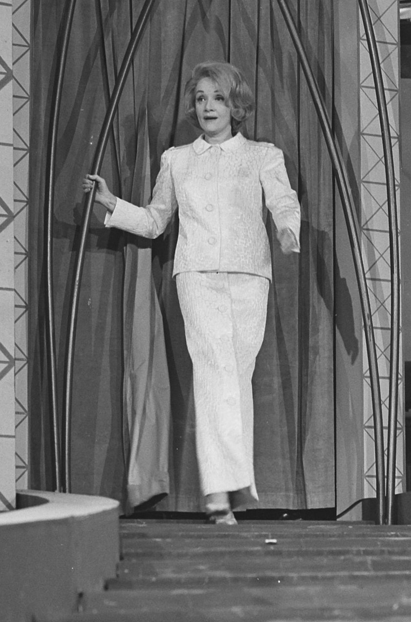 Grand Gala du Disque Populaire in Kurhaus te Scheveningen. Marlene Dietrich.